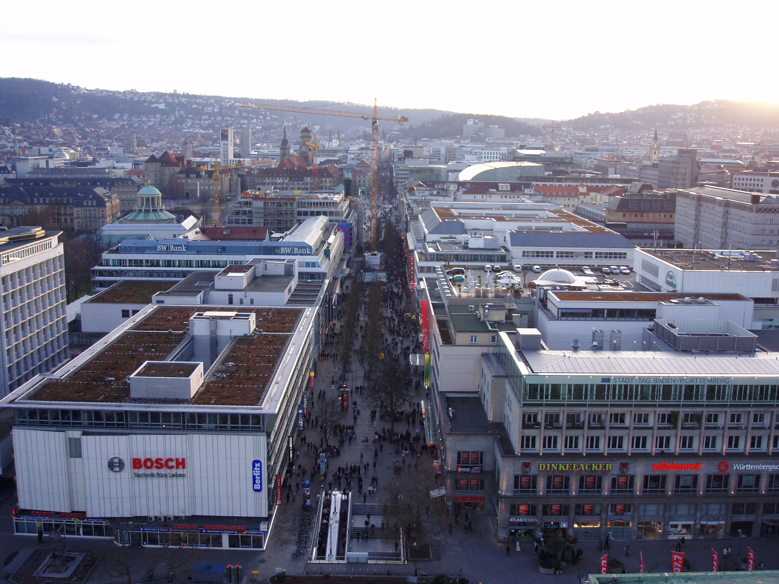 Königstraße Stuttgart, vom Bahnhofsturm aus fotografiert. Der Baukran arbeitet am neuen Phoenix-Bau neben dem Dom St. Eberhard.